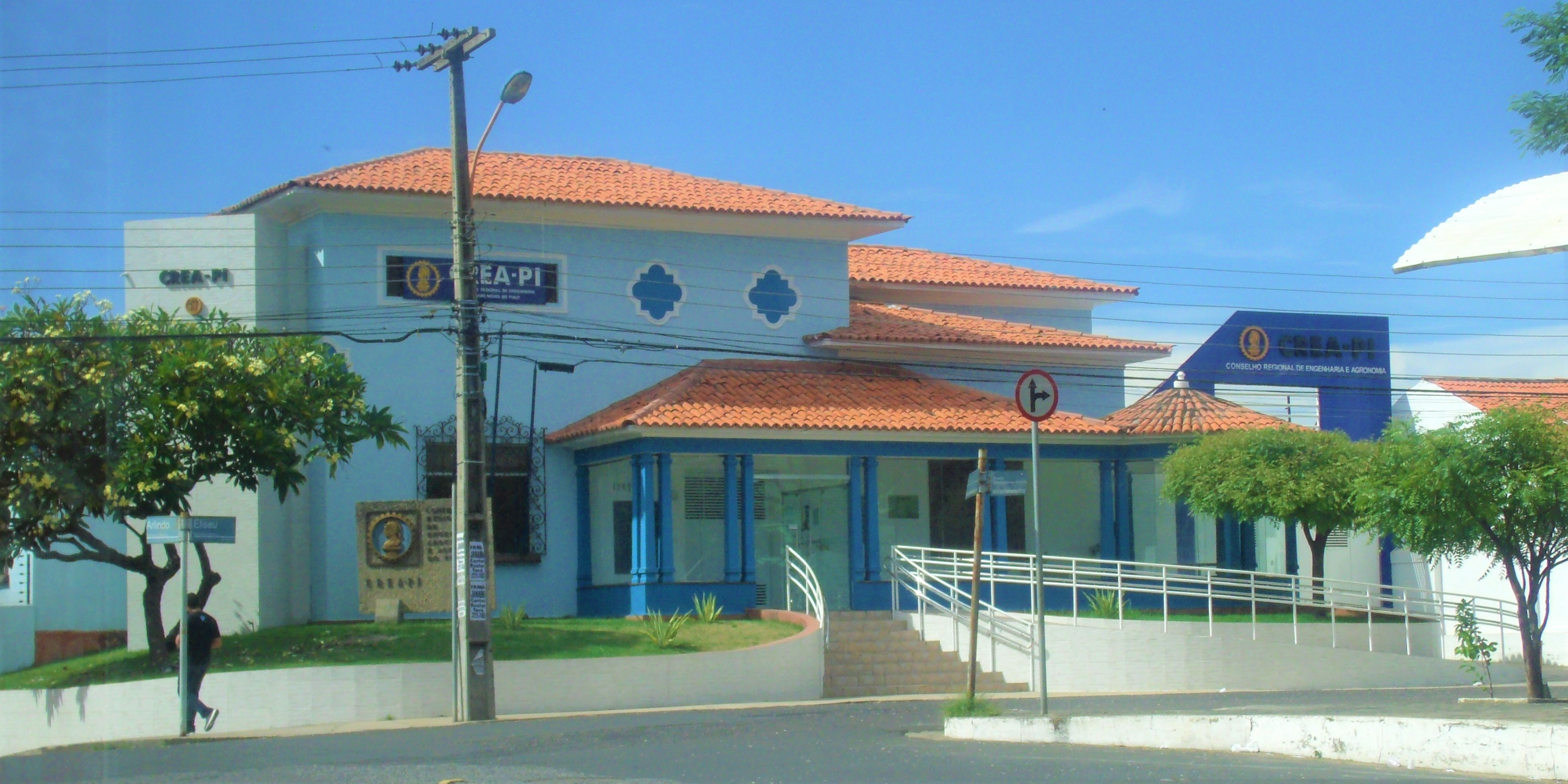 Palacete do Conselho Regional de Engenharia e Agronomia em Teresina, no Piauí.